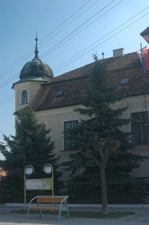 Sobotište, kaštieľ